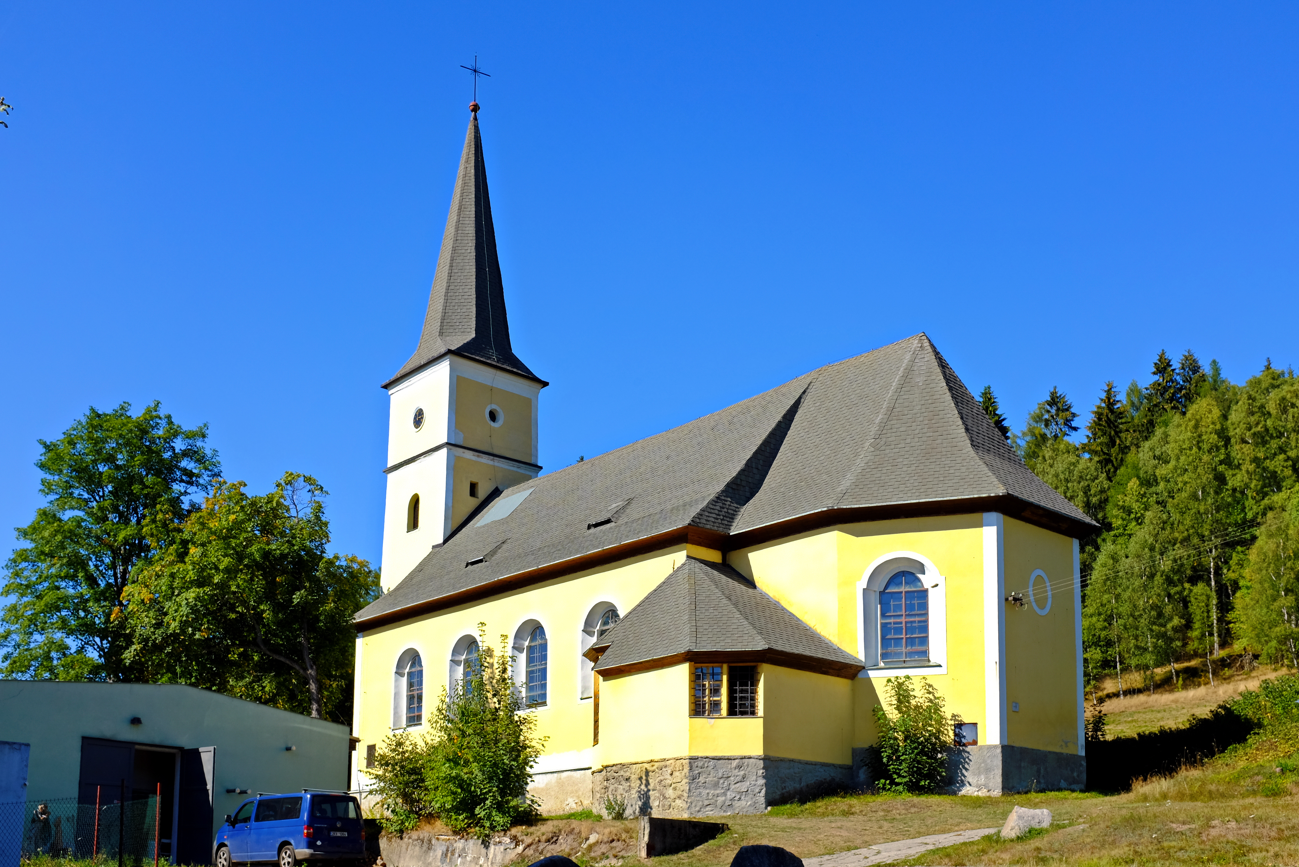 Kostel Navštívení Panny Marie, střed obce, Rudné.